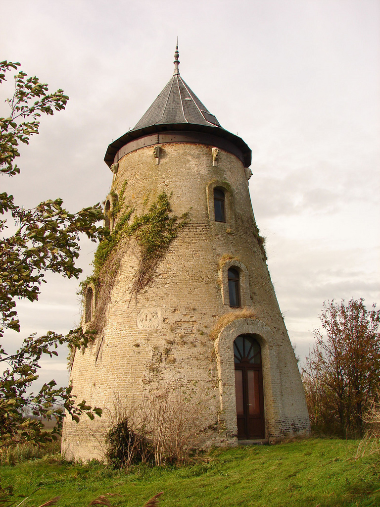 Sint-Gustaafmolen, windmolen ca. 1850 te De Moeren